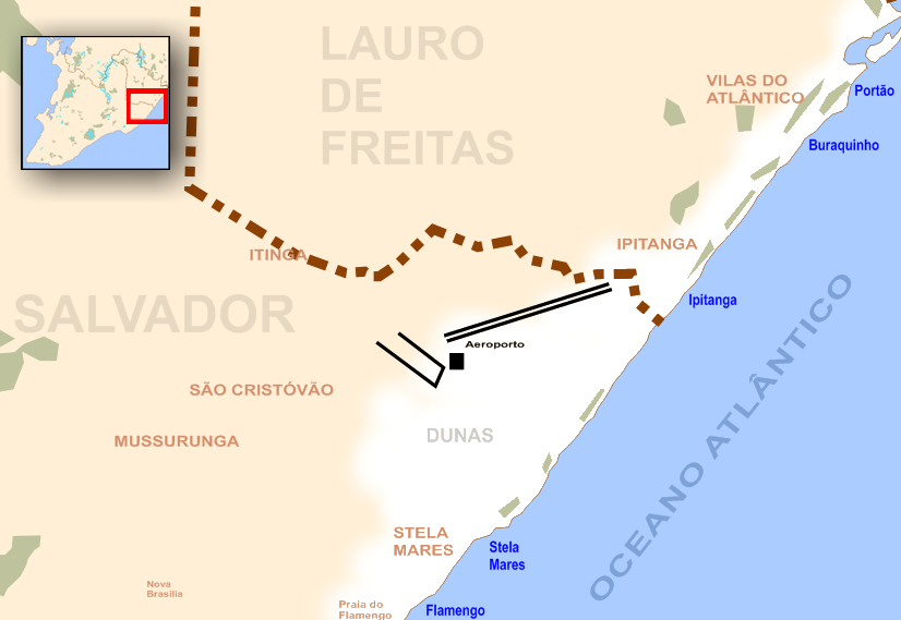 Mapa de Salvador - Lauro de Freitas (Bahia, Brazil) - Praias do Litoral Norte: Flamengo, Stela Mares, Ipitanga, Buraquinho e Portão.